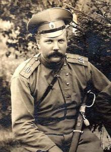 Поспелов Михаил Дмитриевич (1884-1962) российский и советский пограничник